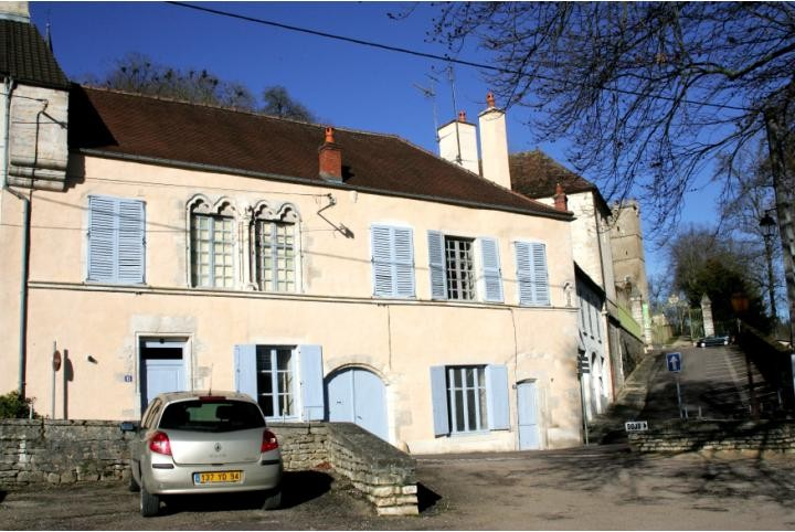 Petit Fontenet, Montbard (Côte d'Or)